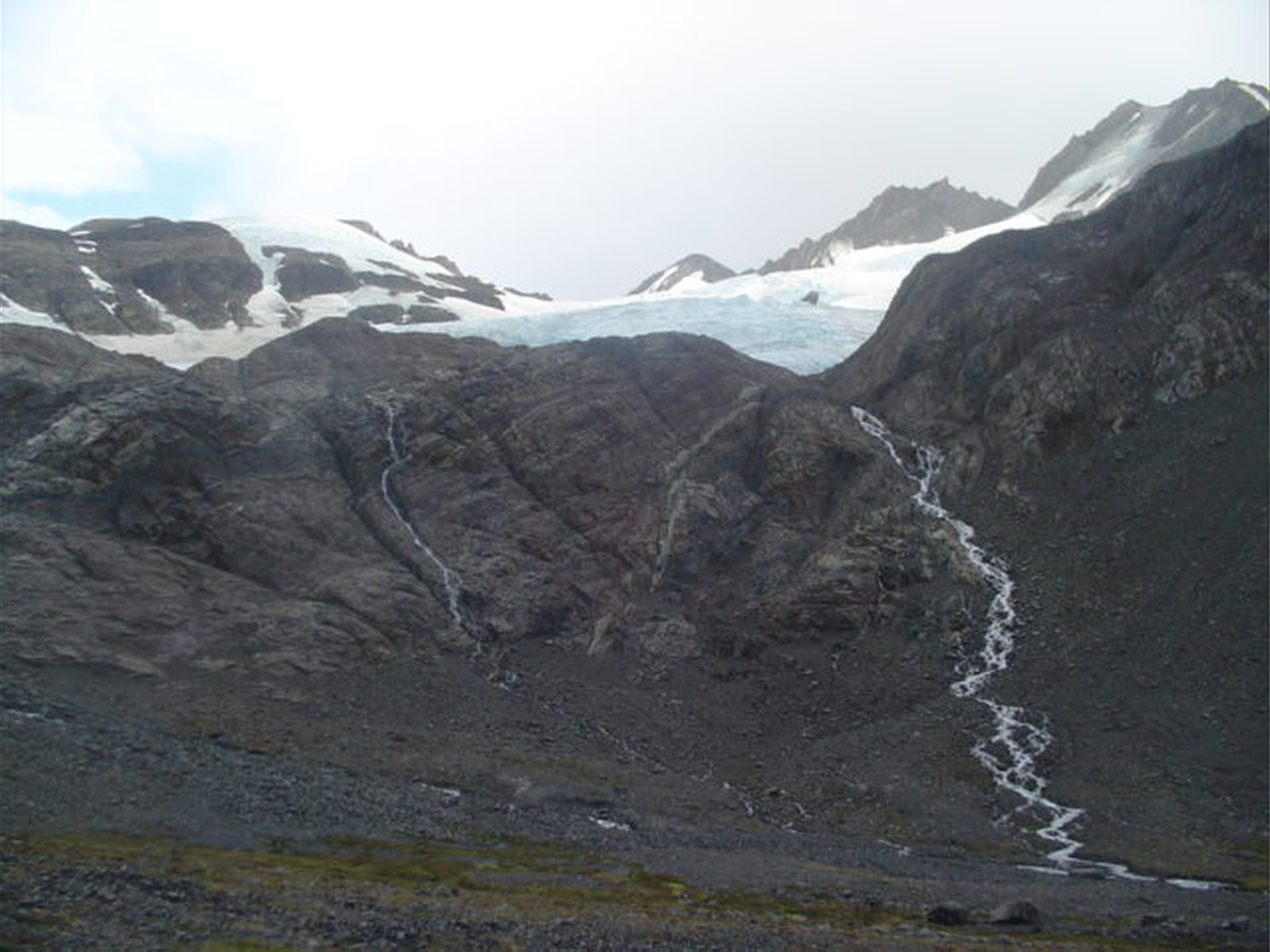 Désert andin, près du paso John Gardner, parc Torres del Paine, Chili